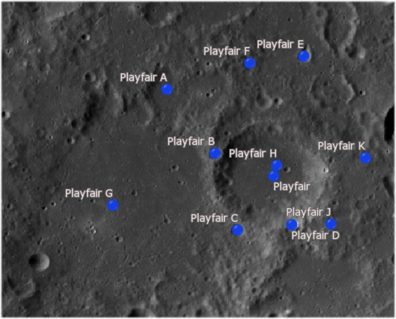 Cráter lunar Playfair. Cráteres satélite. (Imagen LRO)